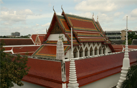 วัดดุสิดาราม วรวิหาร